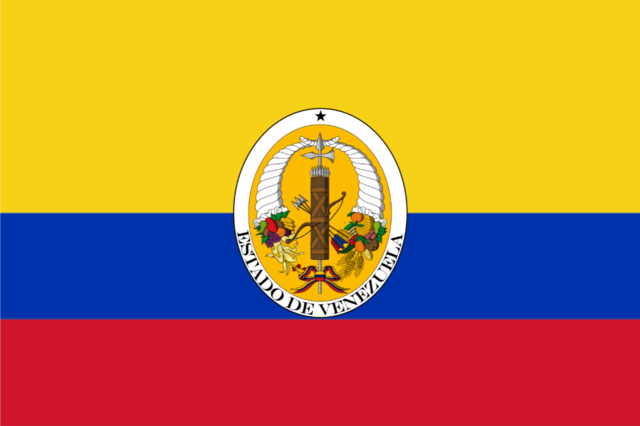 bandera de Venezuela en 1830